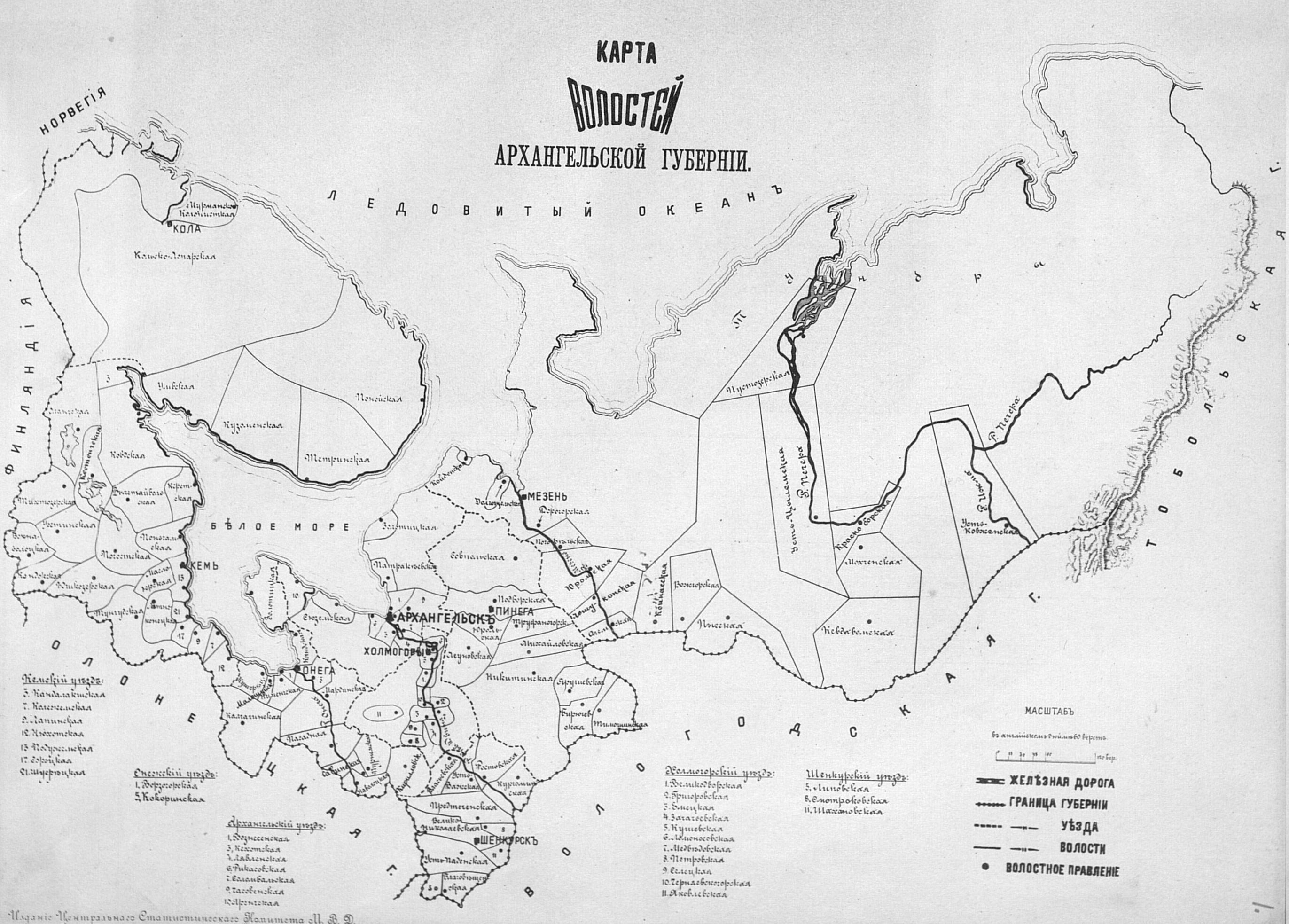 Карта волостей Архангельской губернии